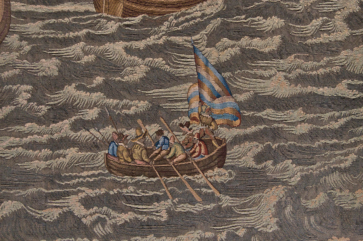 Wandtapijt De slag voor Lillo, Hendrick de Maecht, 30 mei 1574 stuk uit de collectie van het Zeeuws Museum. Gefotografeerd in het kader van Wiki Loves ART NL, met een CC-BY-SA licentie